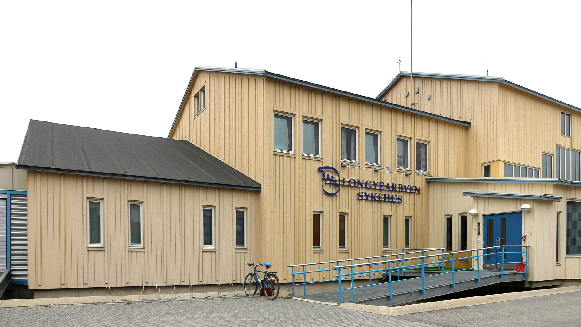 Svalbard, Longyearbyen Hospital